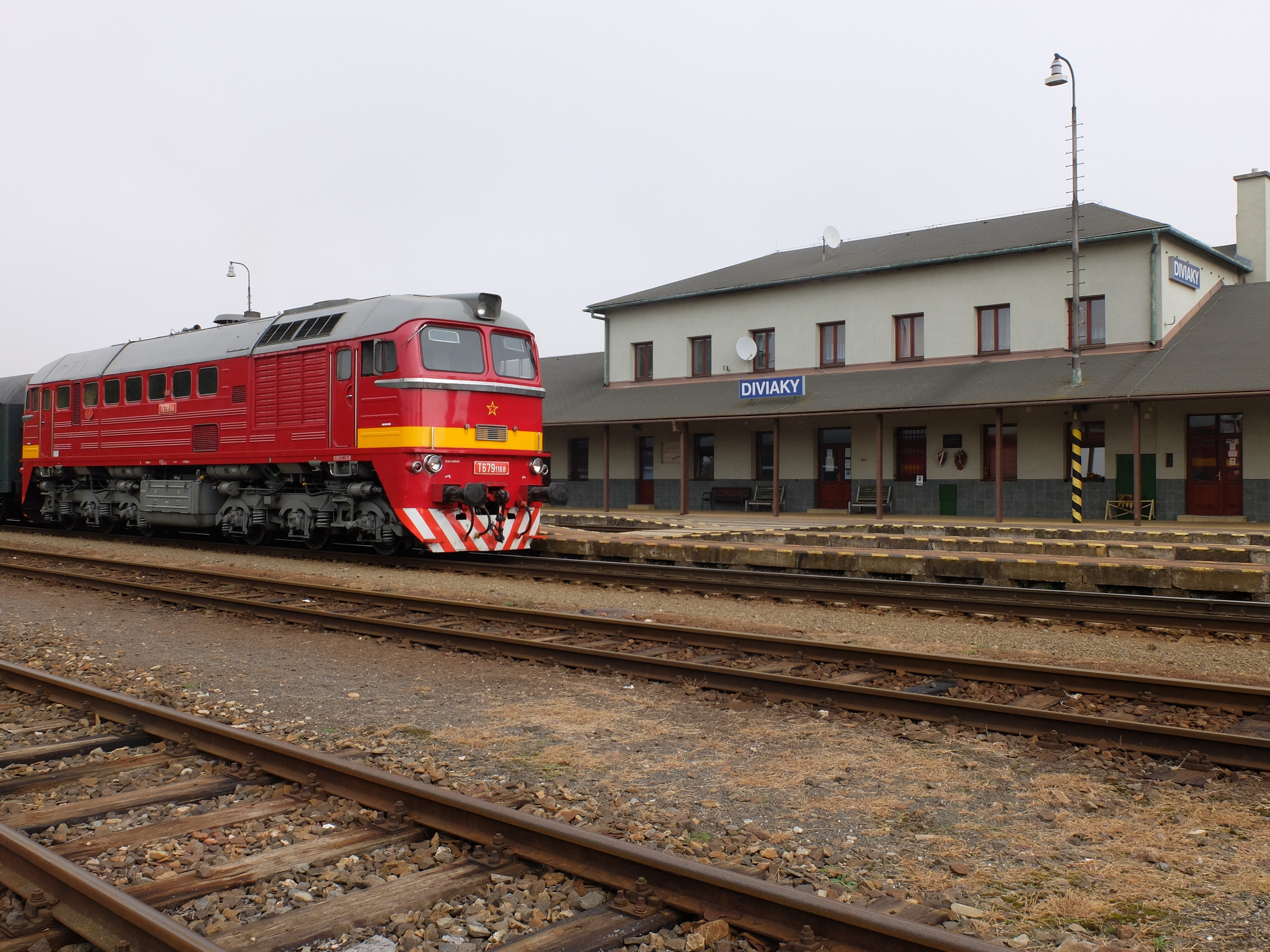 T679 1168 (historische Beschriftung) in Diviaky